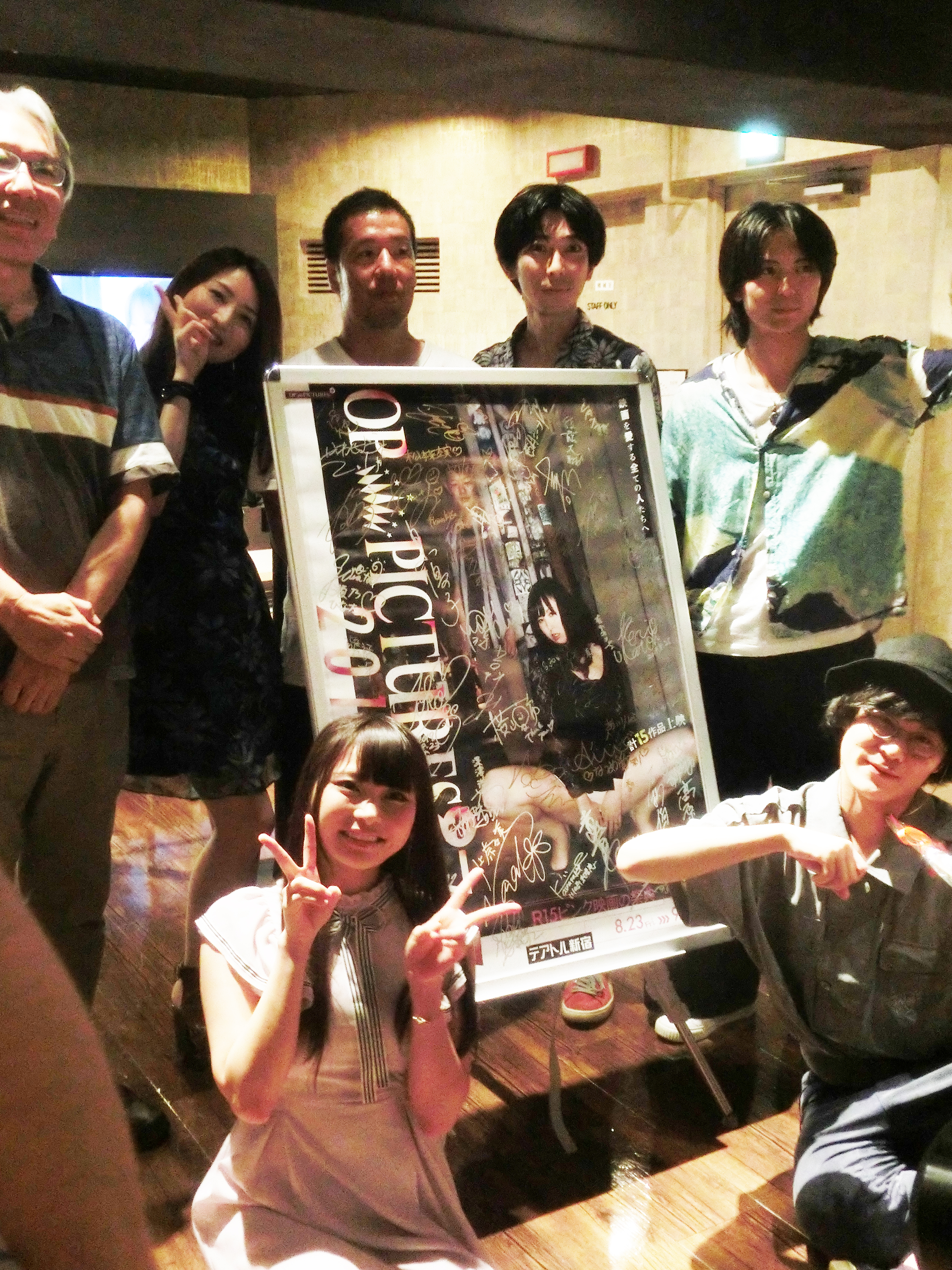 テアトル新宿「アノコノシタタリ」舞台挨拶 2019年8月31日